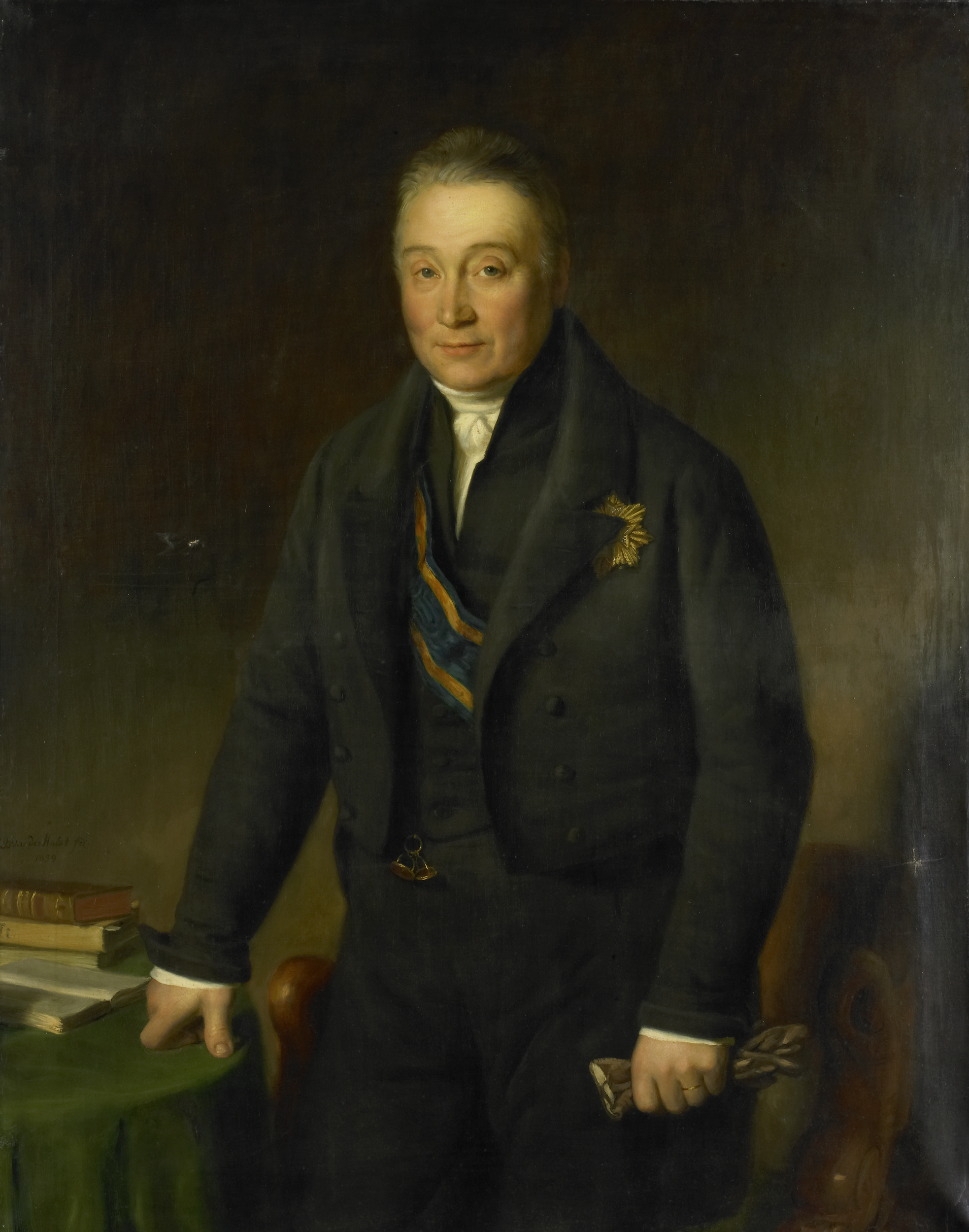 Portret van Adam François Jules Armand, graaf van der Duyn van Maasdam. Kniestuk, staande met de rechterhand leunend op een tafeltje waarop enkele boeken liggen, met handschoenen in de linkerhand.